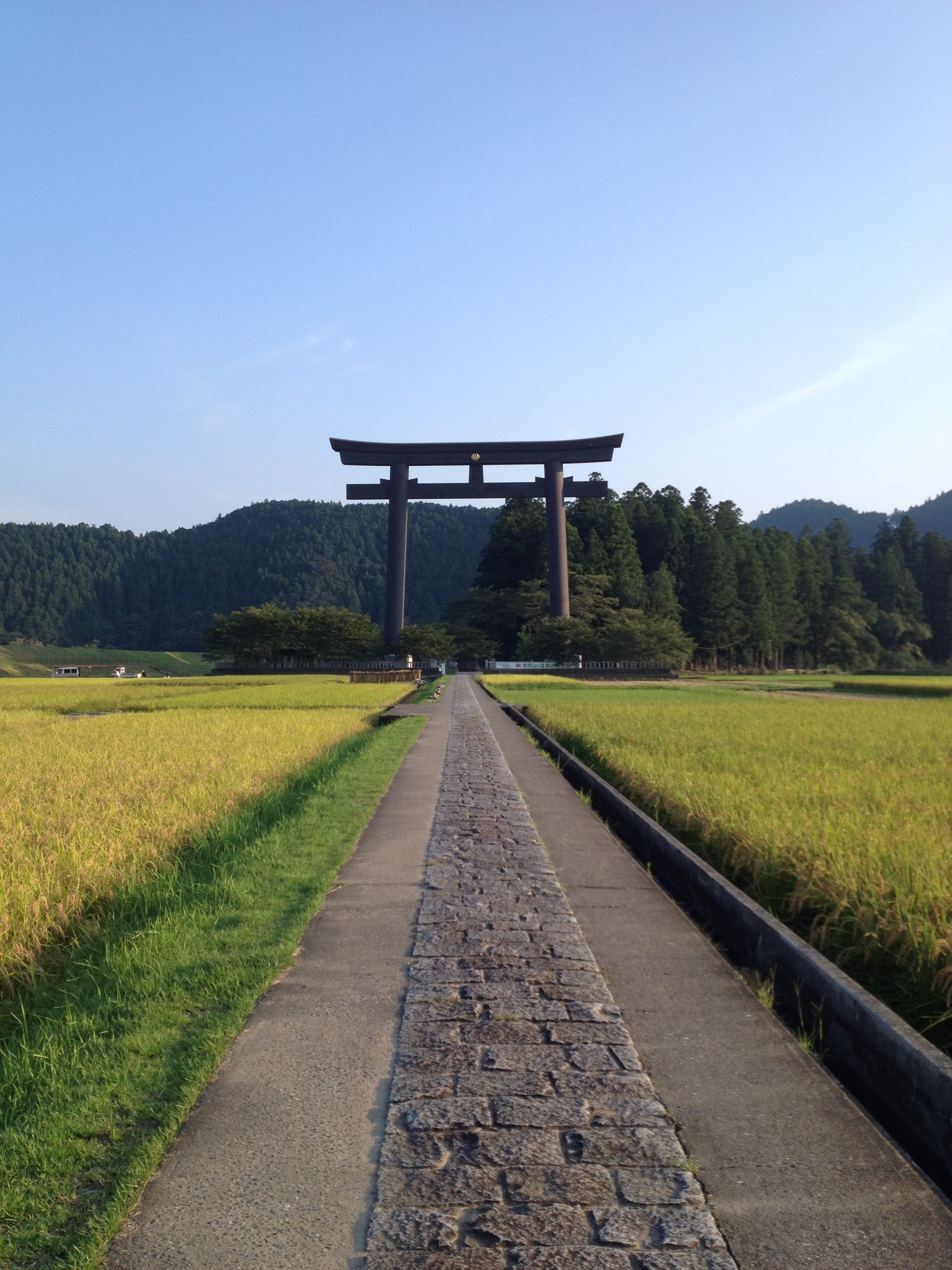 Oyunohara's Torii, near Kumano Hongu Taisha